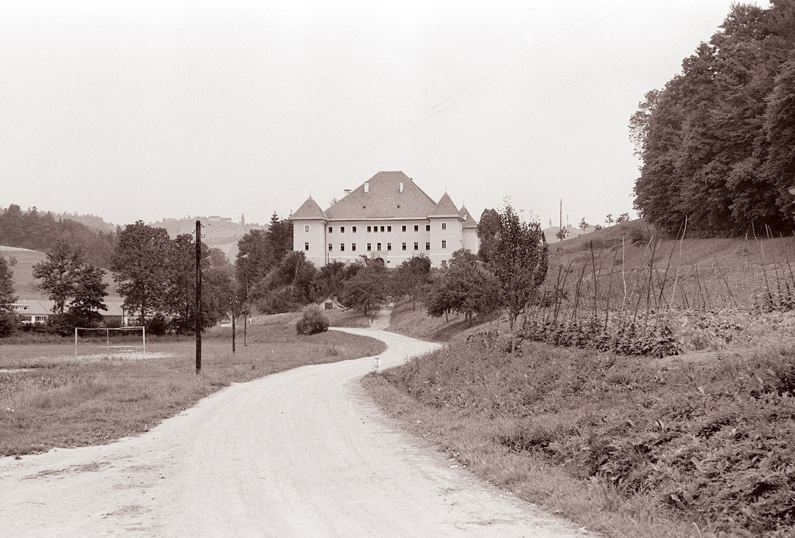 Grad v Svečini